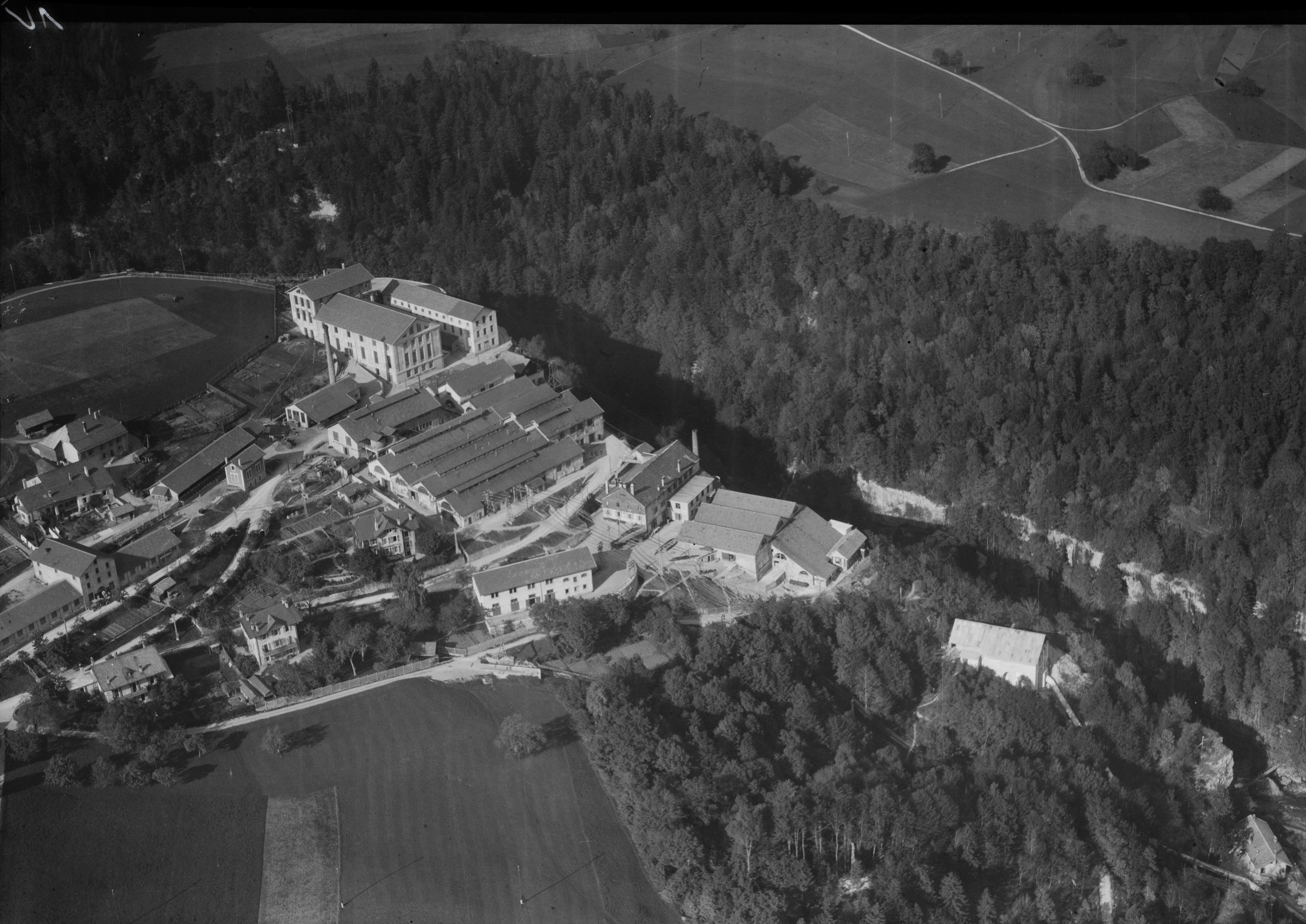 Das Werk der Société d’électrochimie in Saut du Day an der Orbe. Die Produktion von Chlorat begann 1890. Dies war weltweit die erste elektrochemische Fabrik.